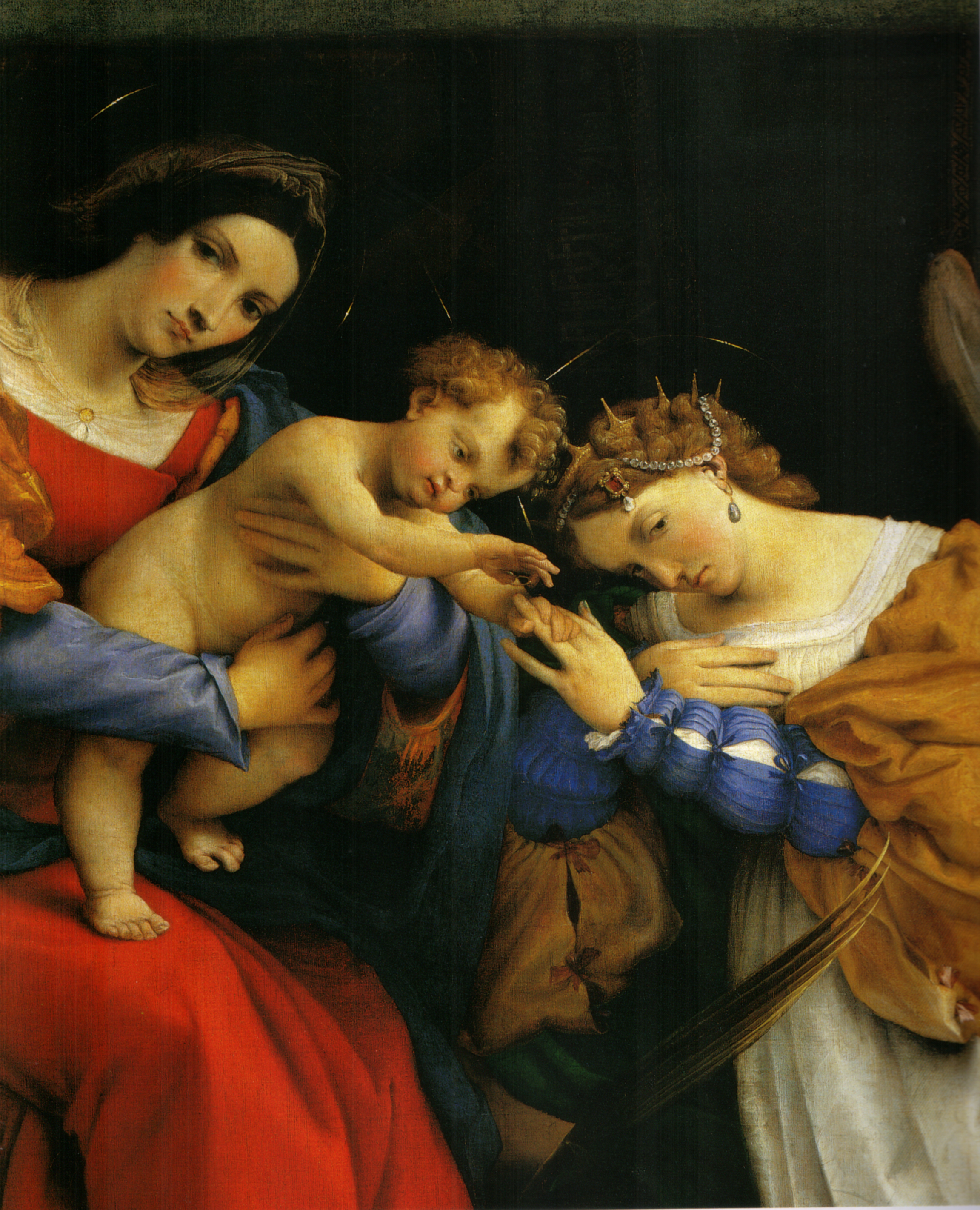 detail